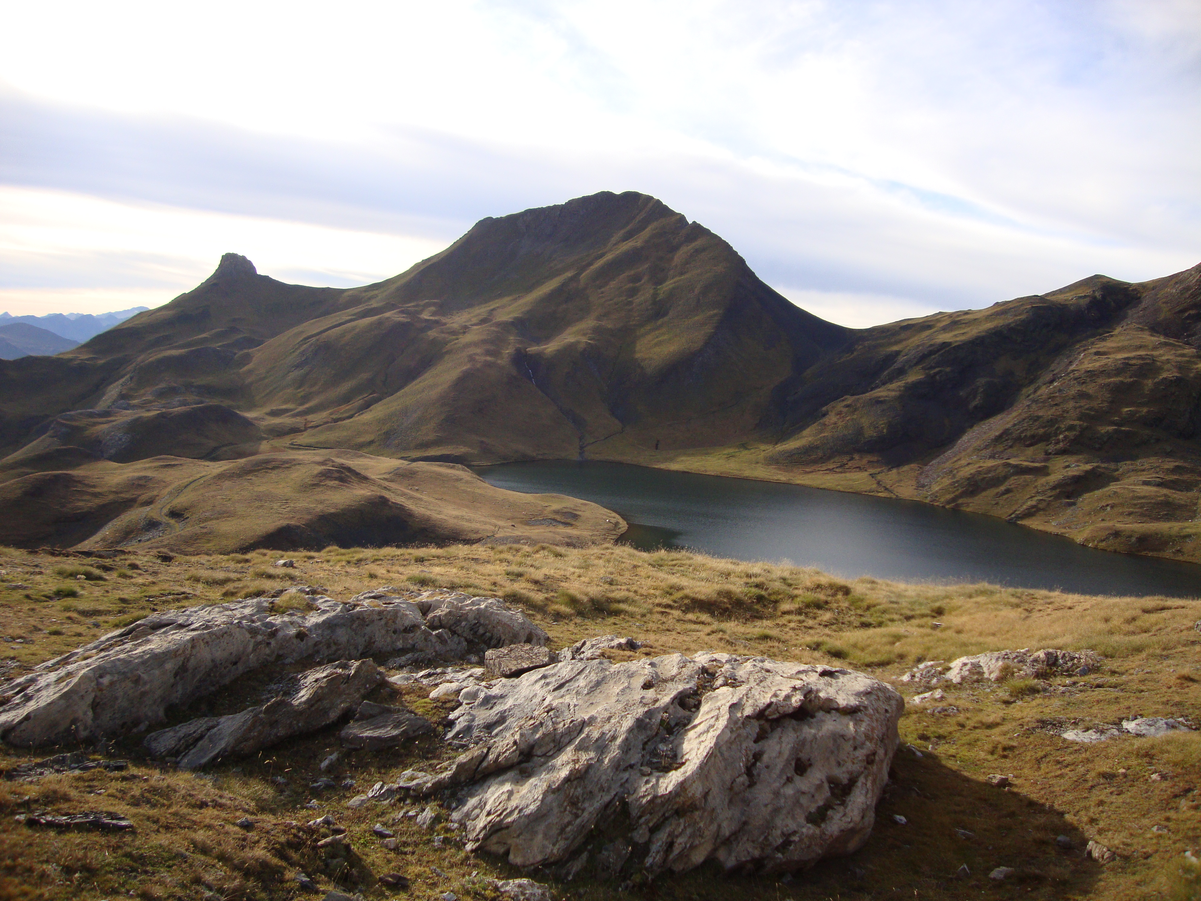 Tuc des Crabes e Lac de Montoliu